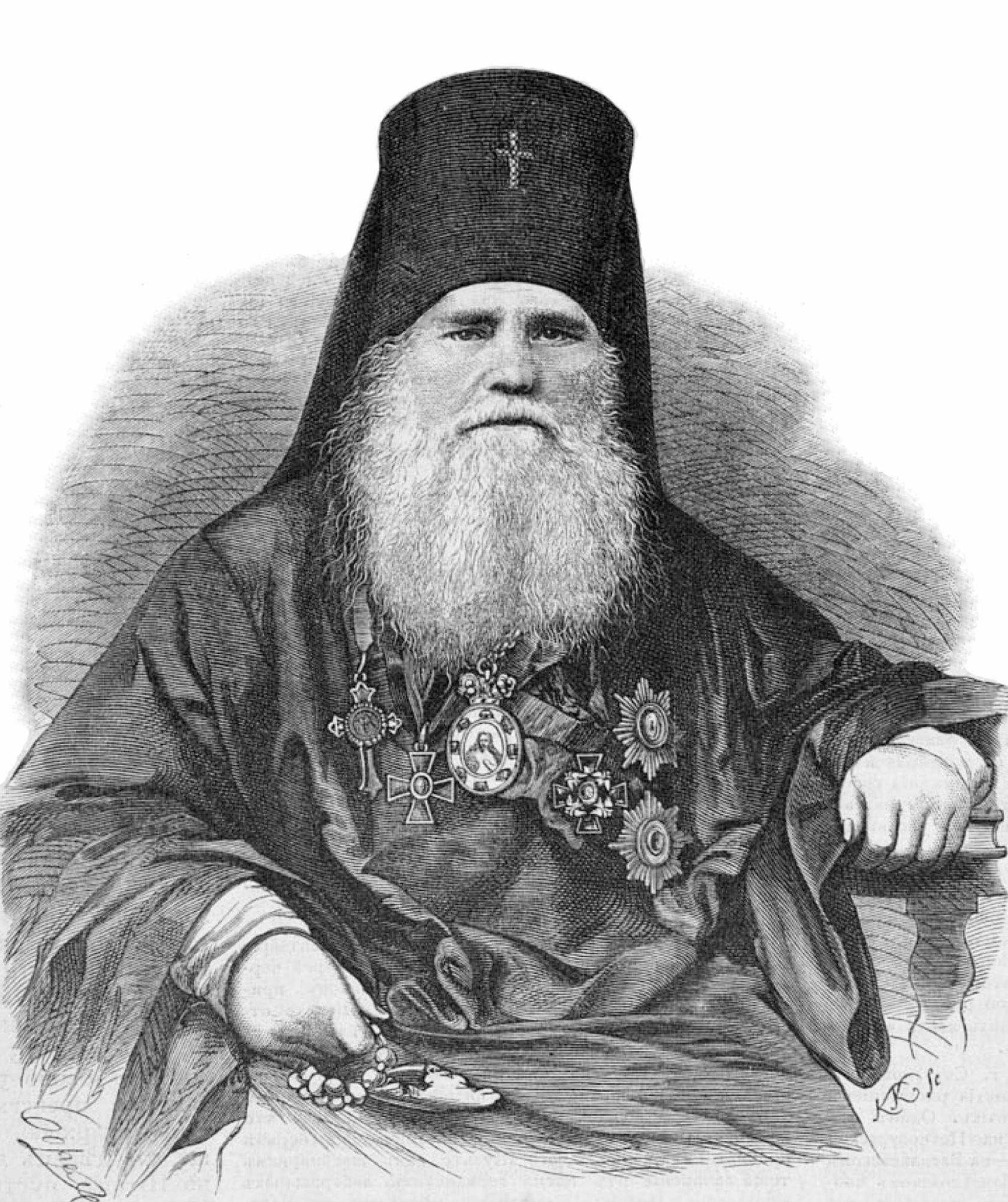 Нил (Исакович), епископ